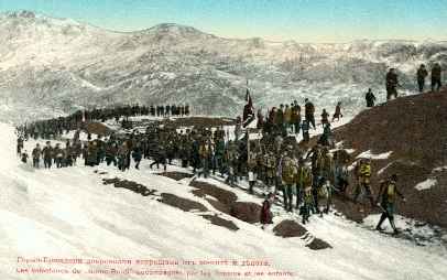 Доброволците от Горно Броди в Македоно-Одринското опълчение